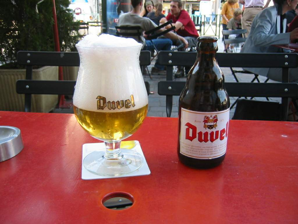 Cannette et verre de bière tradition Duvel